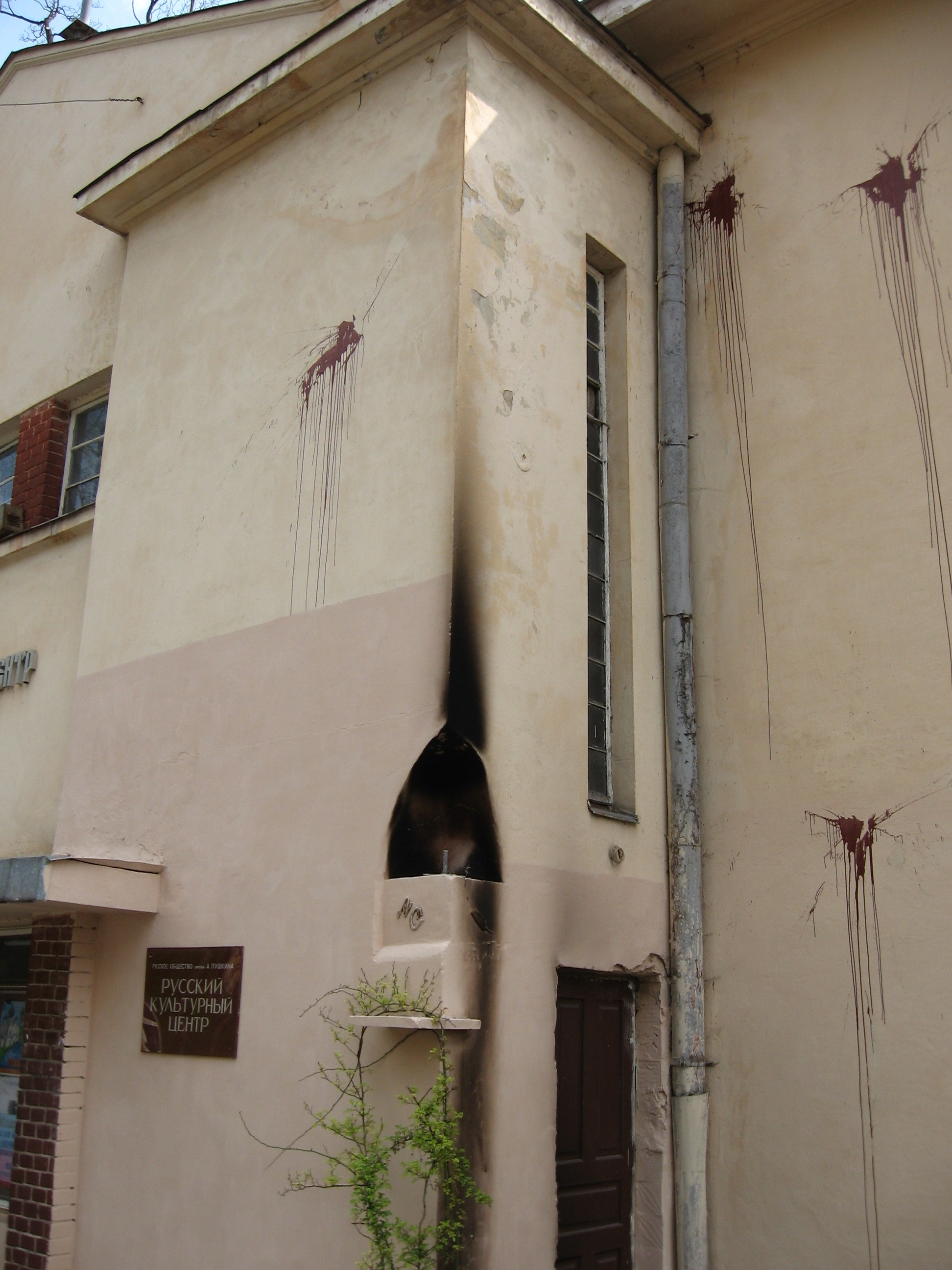 seem's like vandalized Russian Cultural Center in Lviv